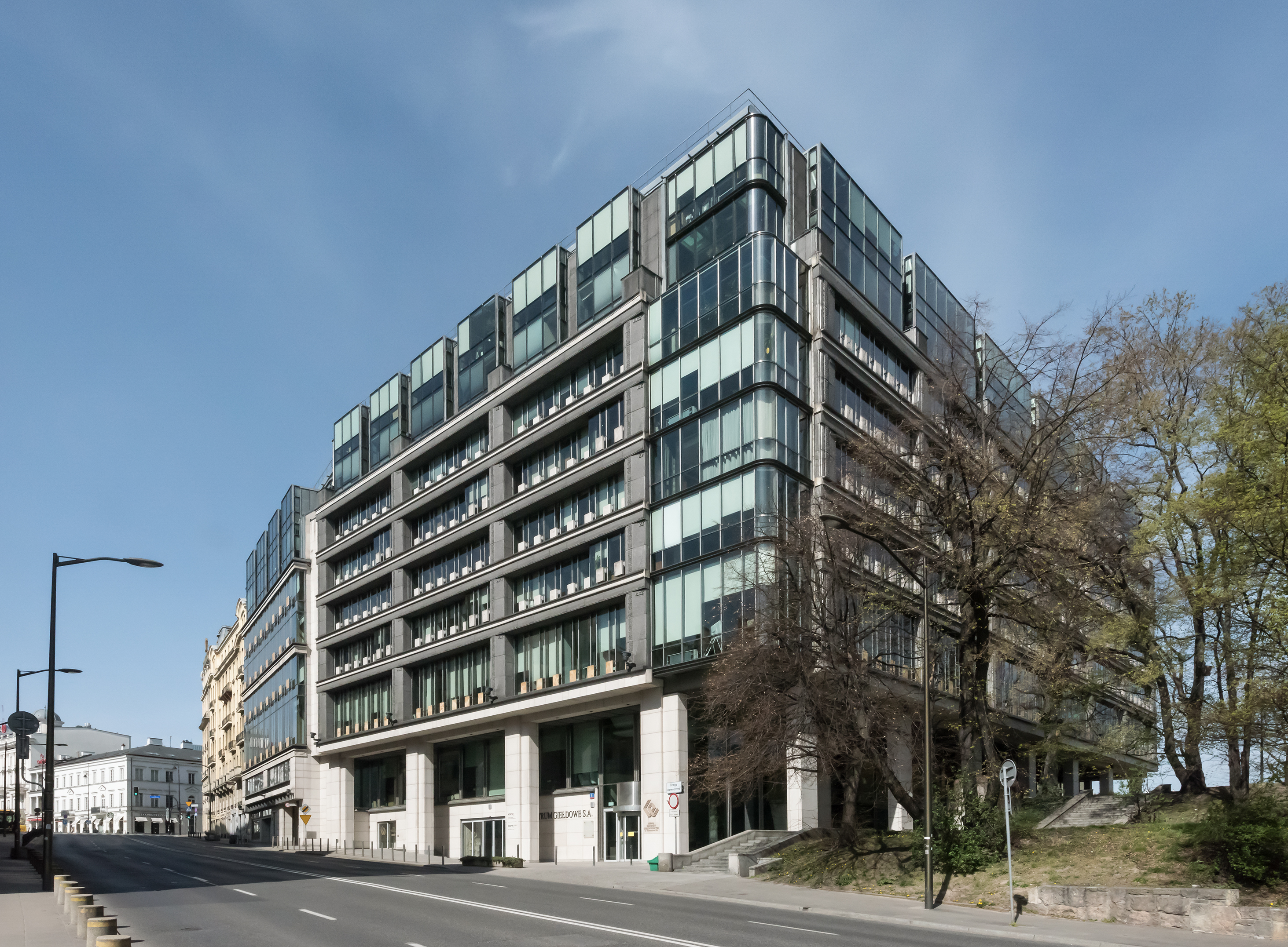 Budynek Giełdy Papierów Wartościowych w Warszawie przy ul. Książęcej 4 w Warszawie